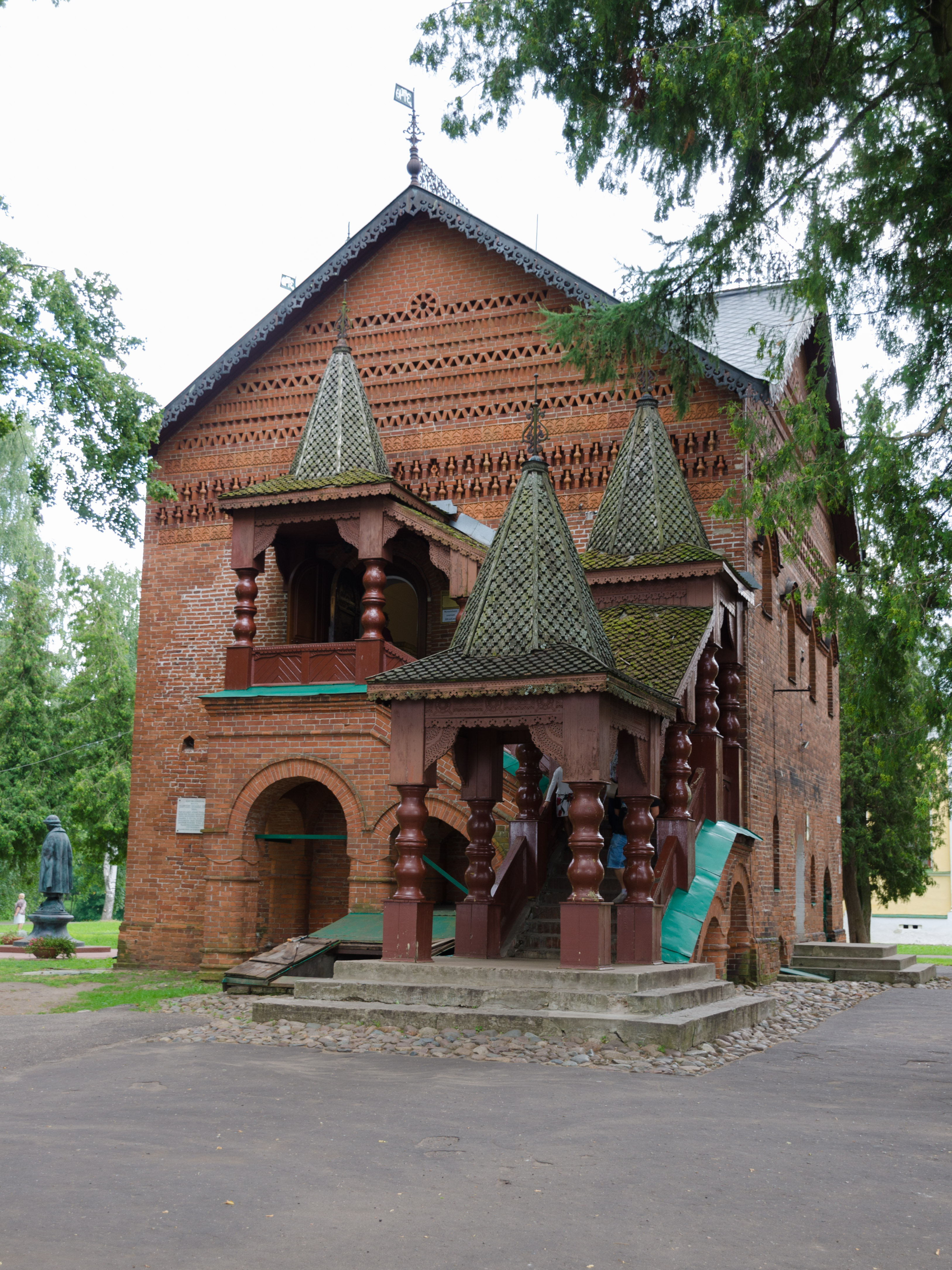 Палаты царевича Дмитрия (Палаты угличских князей): улица Кремль, 4, Углич, Ярославская область